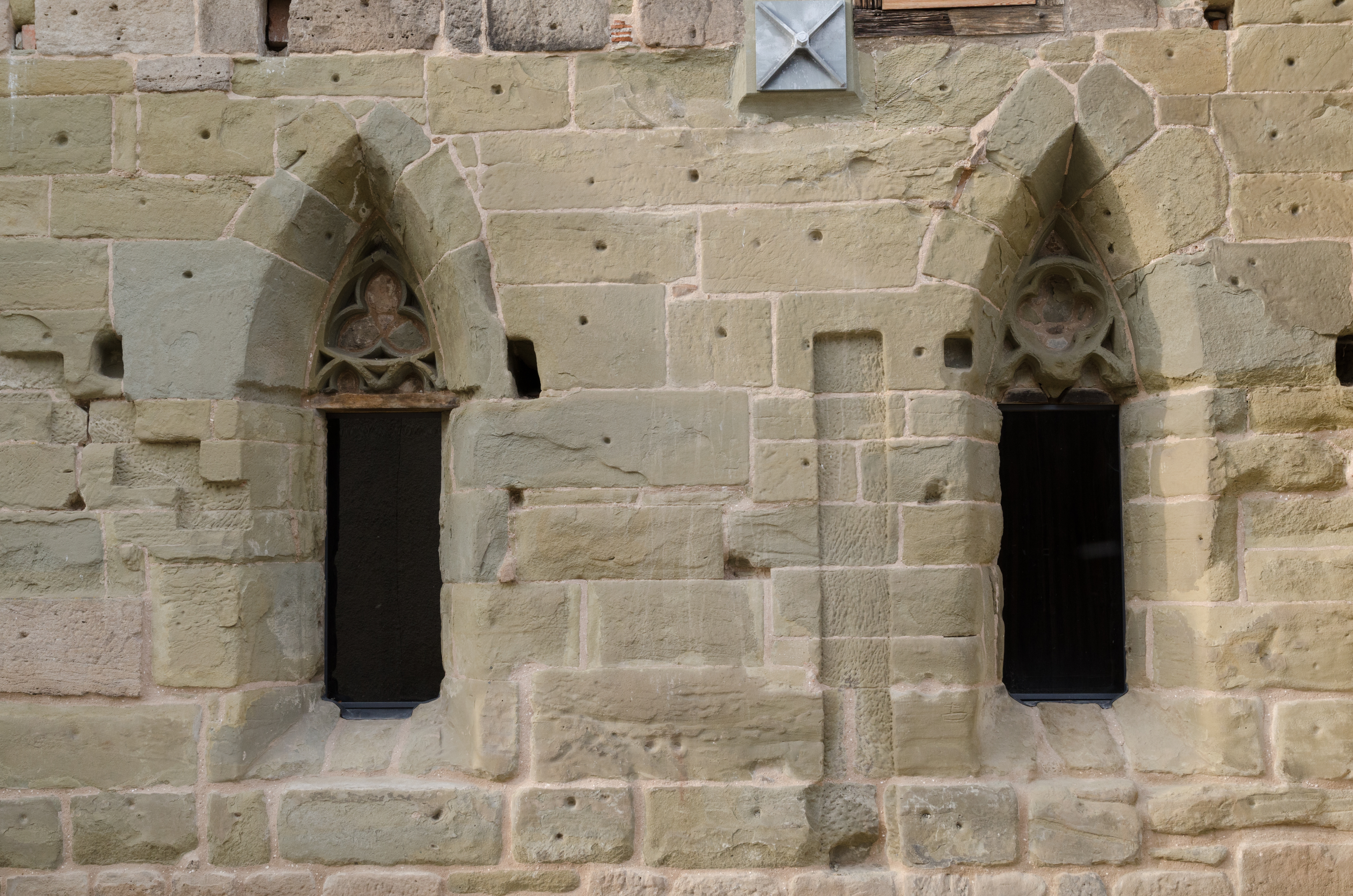 Birkenfeld, Klosterplatz 3